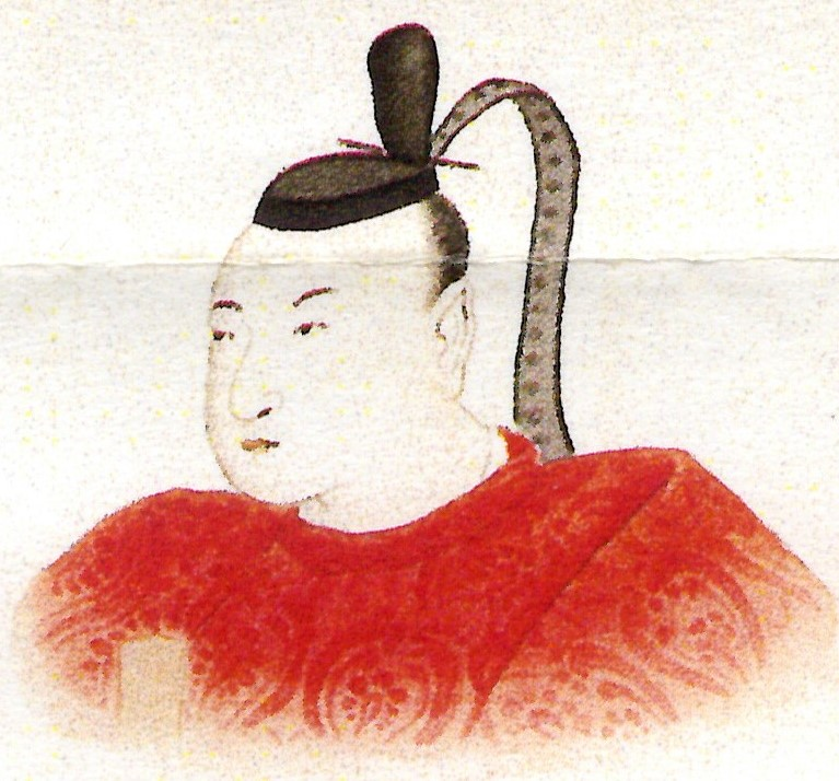 板倉勝武の肖像。